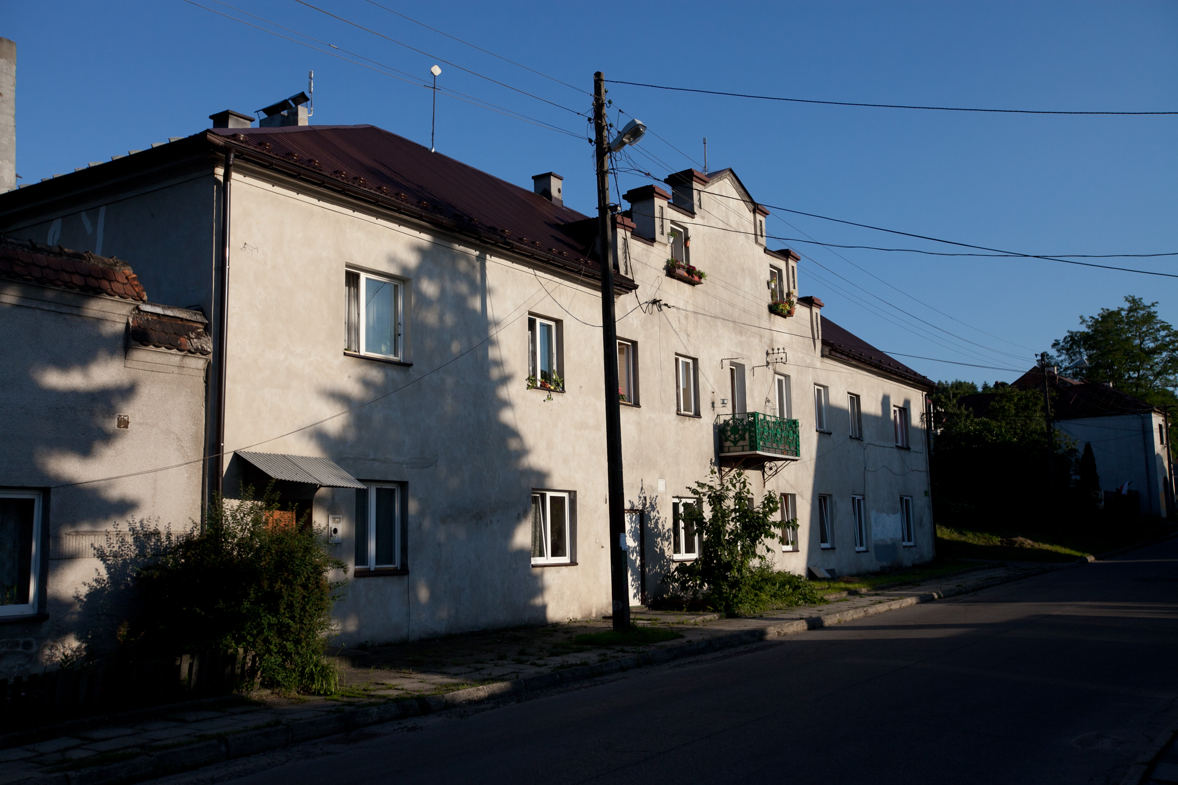 Wieliczka, Klasno, zabudowa